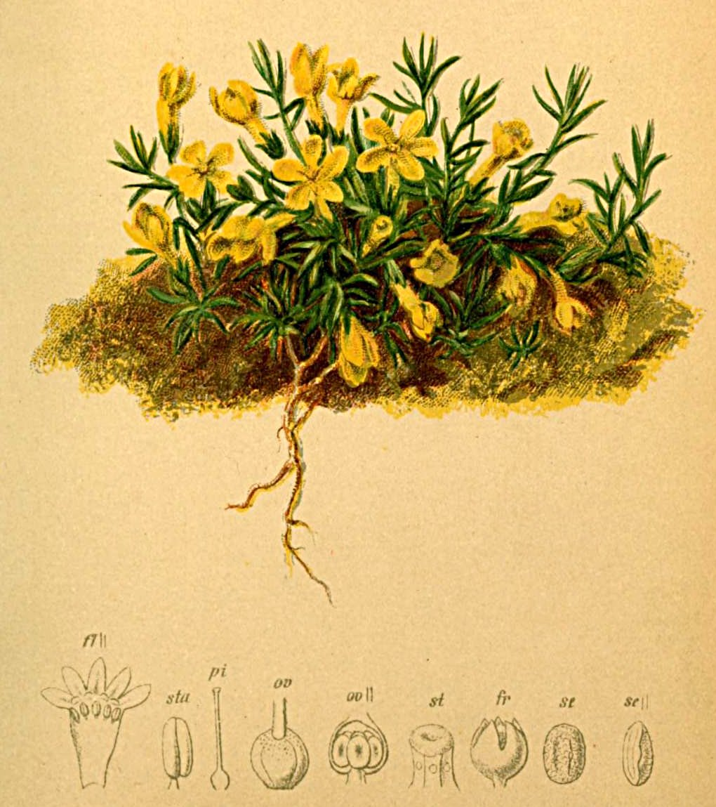 Aretia vitaliana